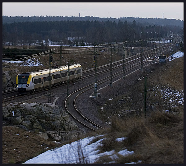 Regionaltåg från Göteborg C till Vänersborg C bromsar in till stationen i Öxnered. Tåget går på den nybyggda banan mellan Öxnered och Trollhättan.